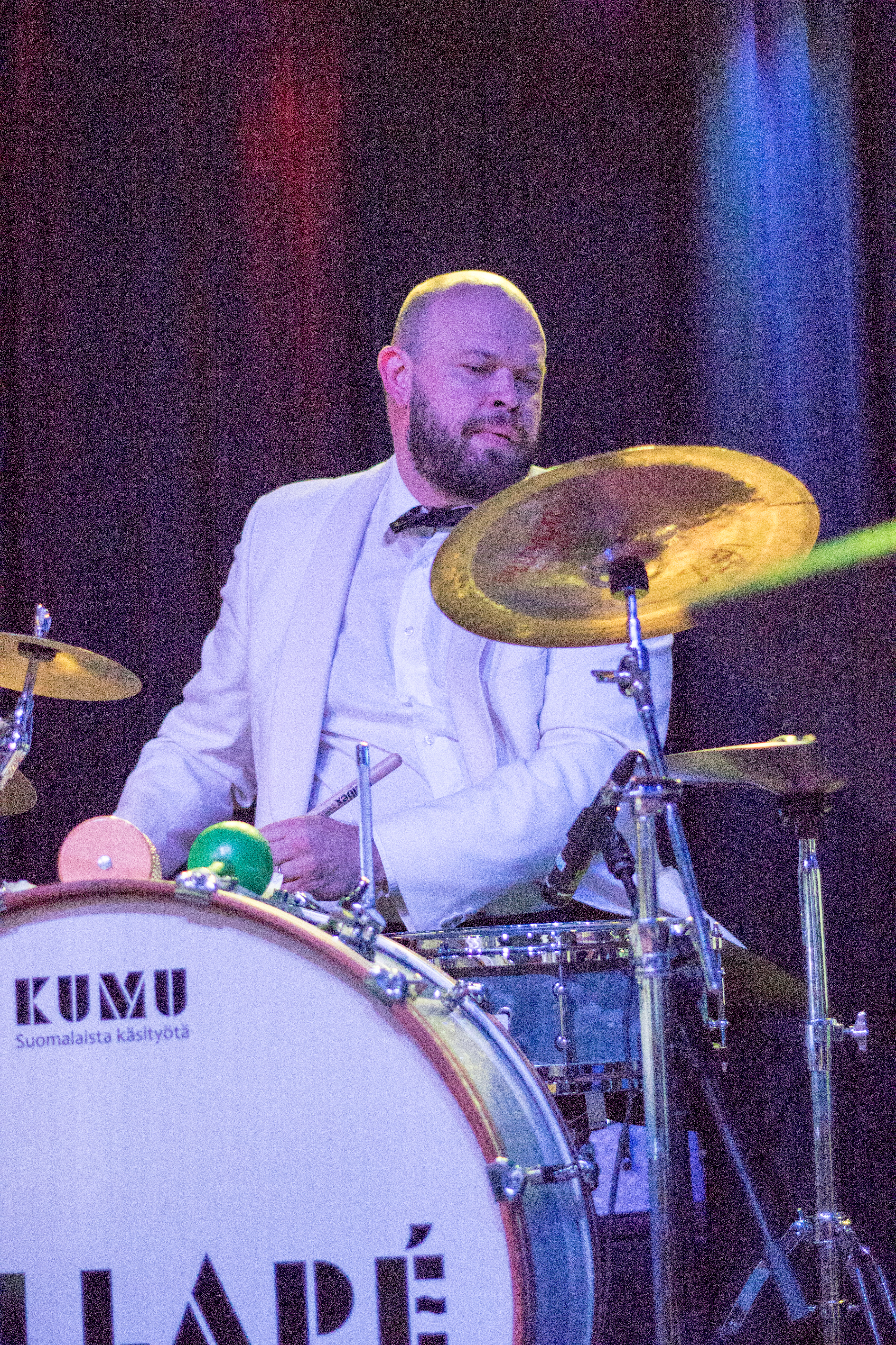 Mikko Hassinen suomalainen rumpali